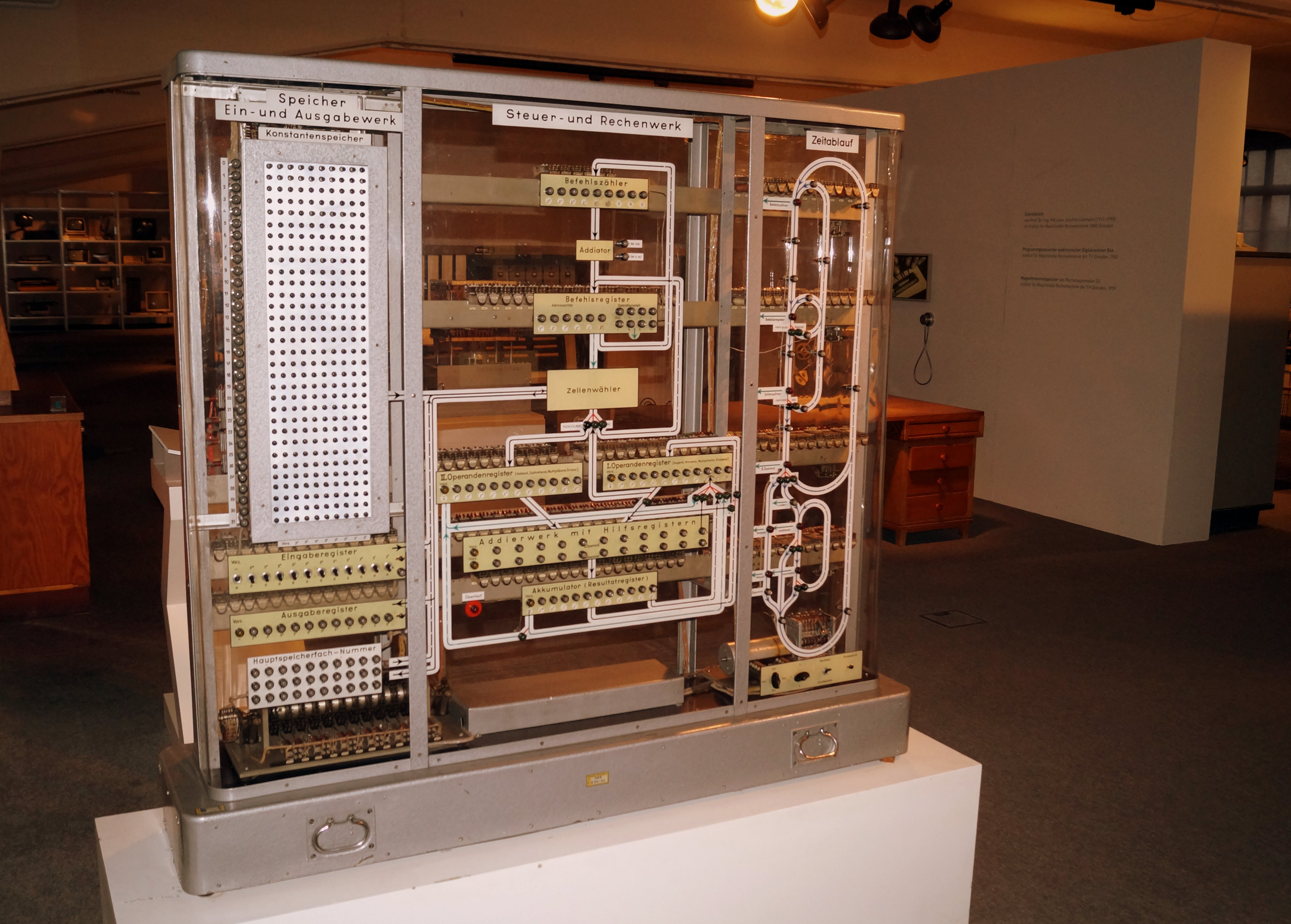 Modellrechenautomat der TH Dresden (Institut fuer maschinelle Rechnentechnik) mit von-Neumann-Architektur in den Technischen Sammlungen Dresden